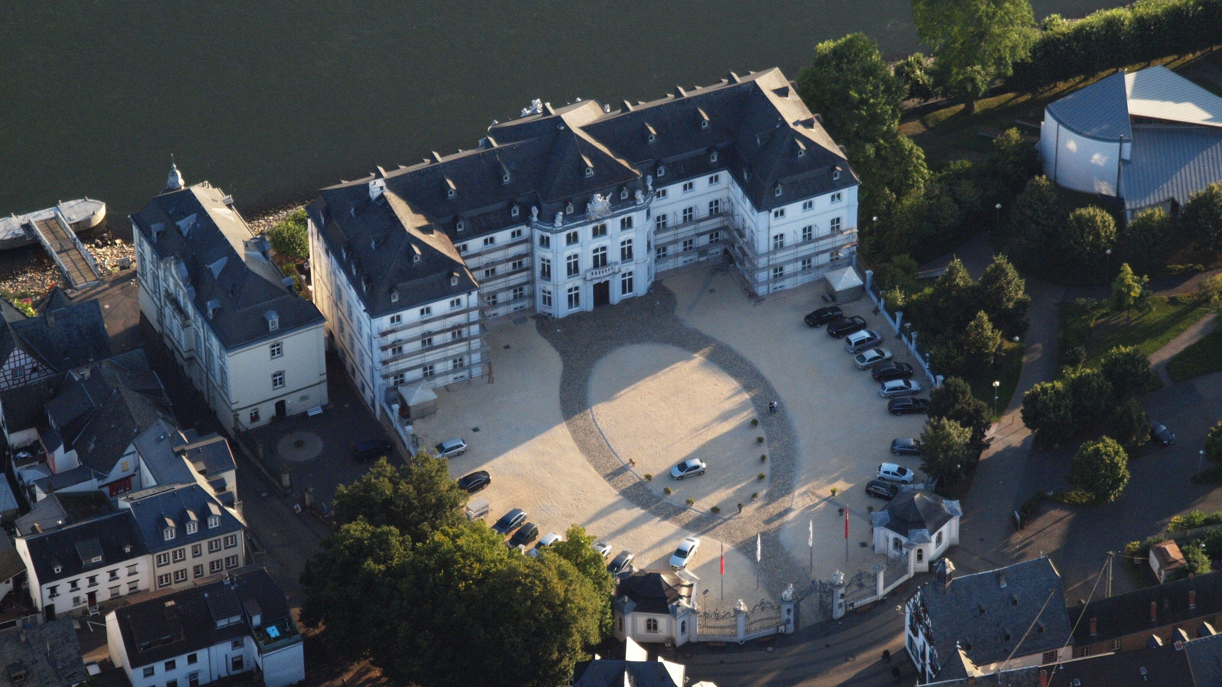 Schloss Engers: Luftaufnahme aus östlicher Richtung